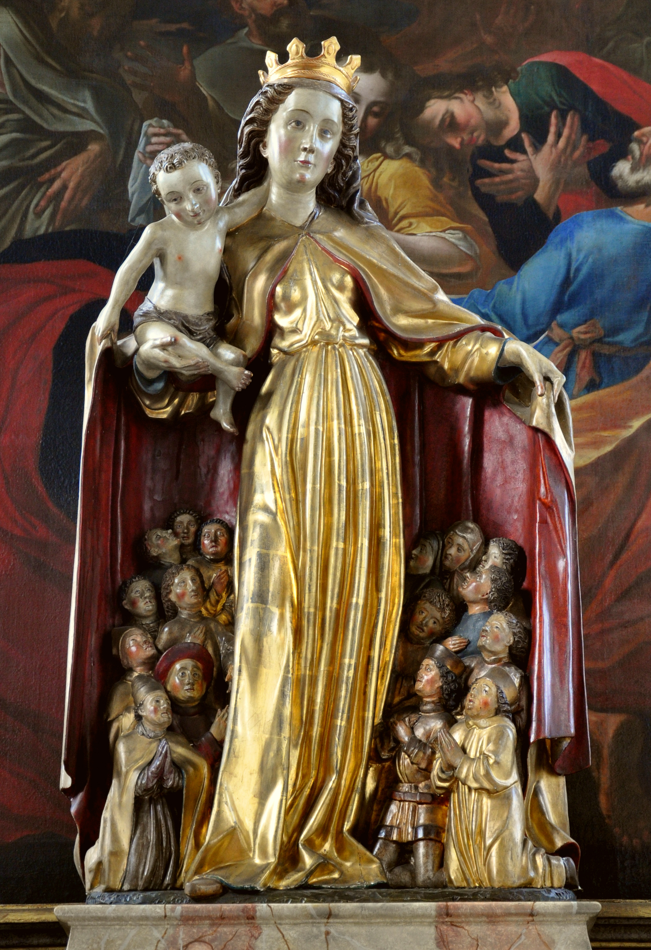 Kath. Pfarrkirche St. Nikolaus, Markdorf; Schutzmantelkapelle Schutzmantelmadonna von Hans Rueland, 1474